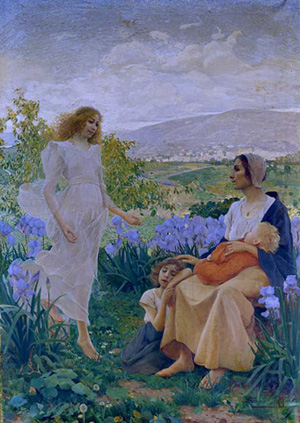 "Auxiliun ex alto", olio su tela, Collezioni comunali, Bologna